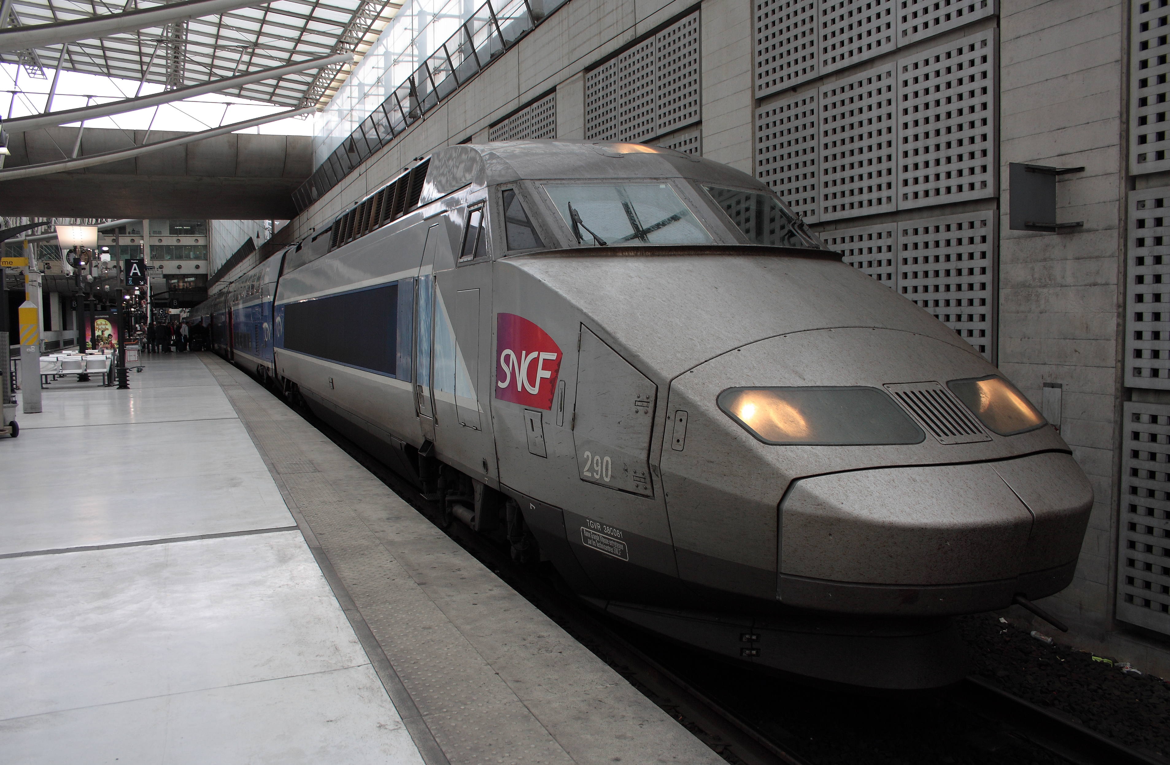 À la suite du début d'incendie de l'une de ses deux motrices le 23 septembre 2013 en gare de Lyon-Part-Dieu, la rame TGV Duplex 290 (en livrée Atlantique) a circulé avec la motrice de réserve Réseau tricourant 380081 (en livrée Lacroix).